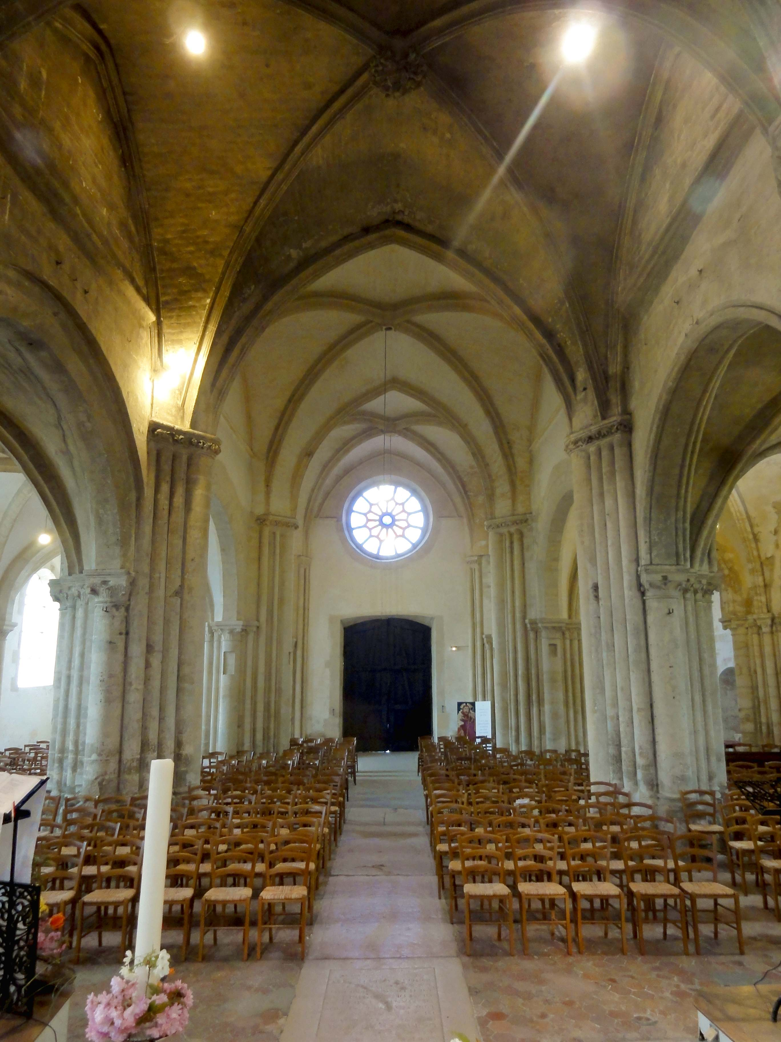 Intérieur de l'église - voir titre.